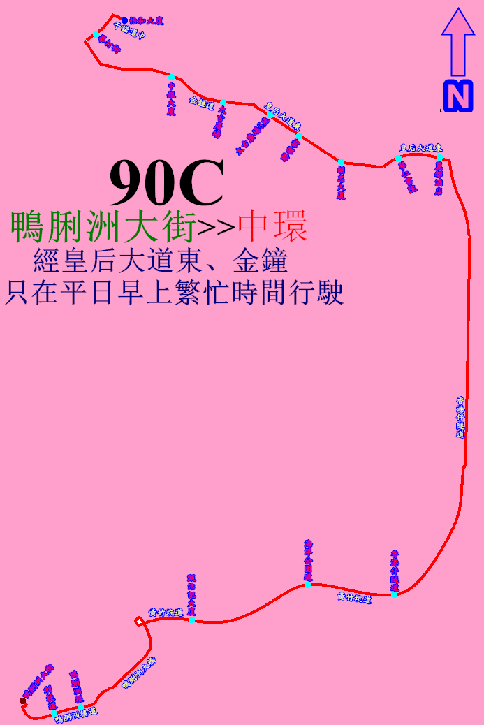 中文（香港）: 城巴90C線的走線圖